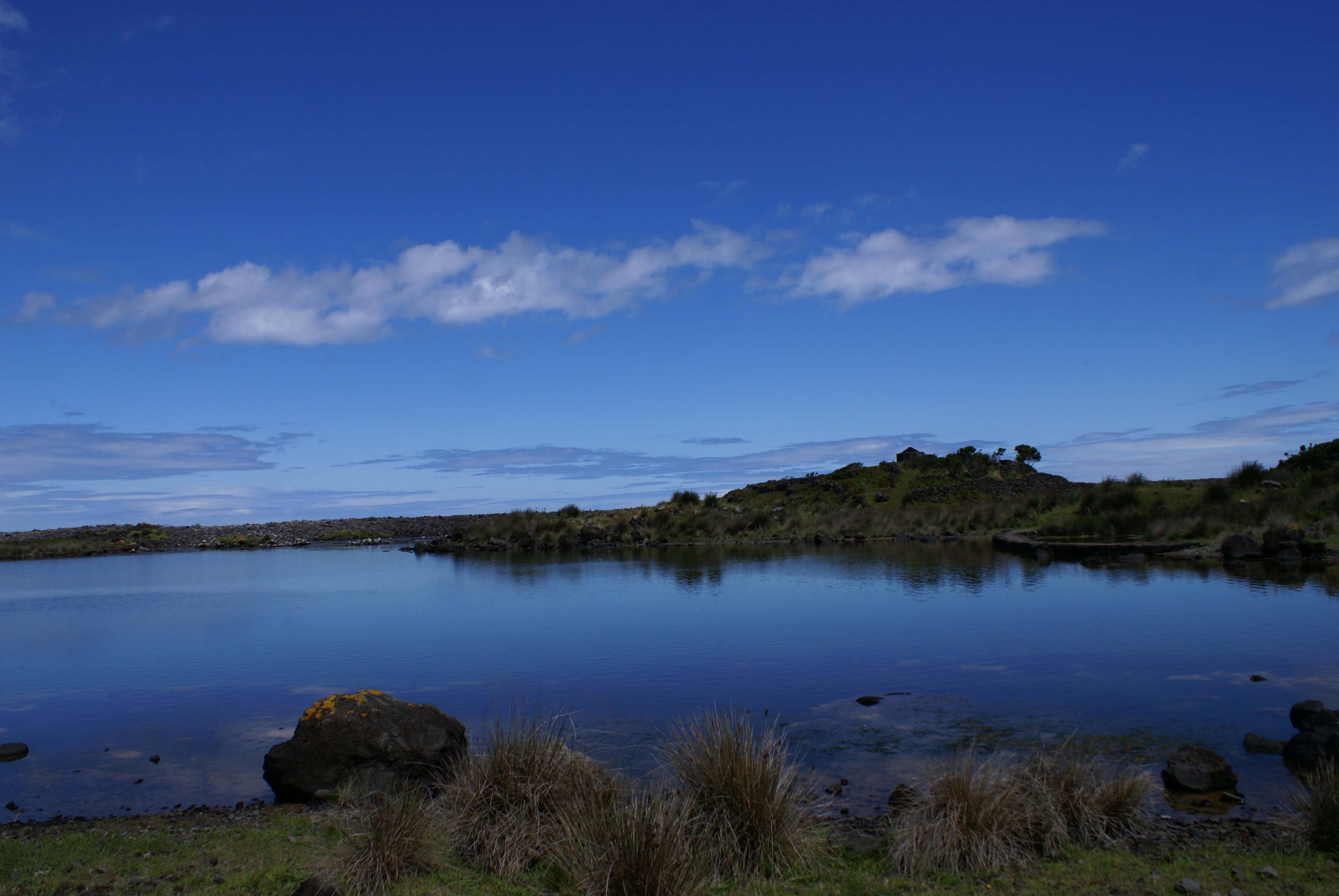 Lagoa da Fajã dos Cubres e as cores, Calheta, ilha de São Jorge, Açores